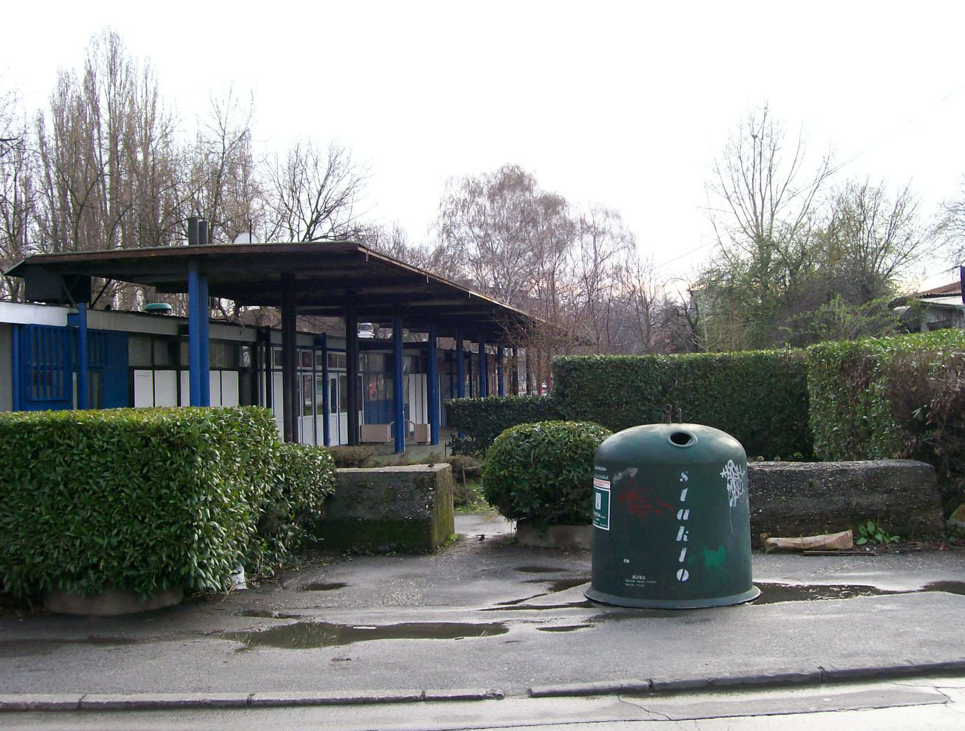 Nekadašnji kolodovr Samoborčeka u Zagrebu, u ulici Božidara Adžije